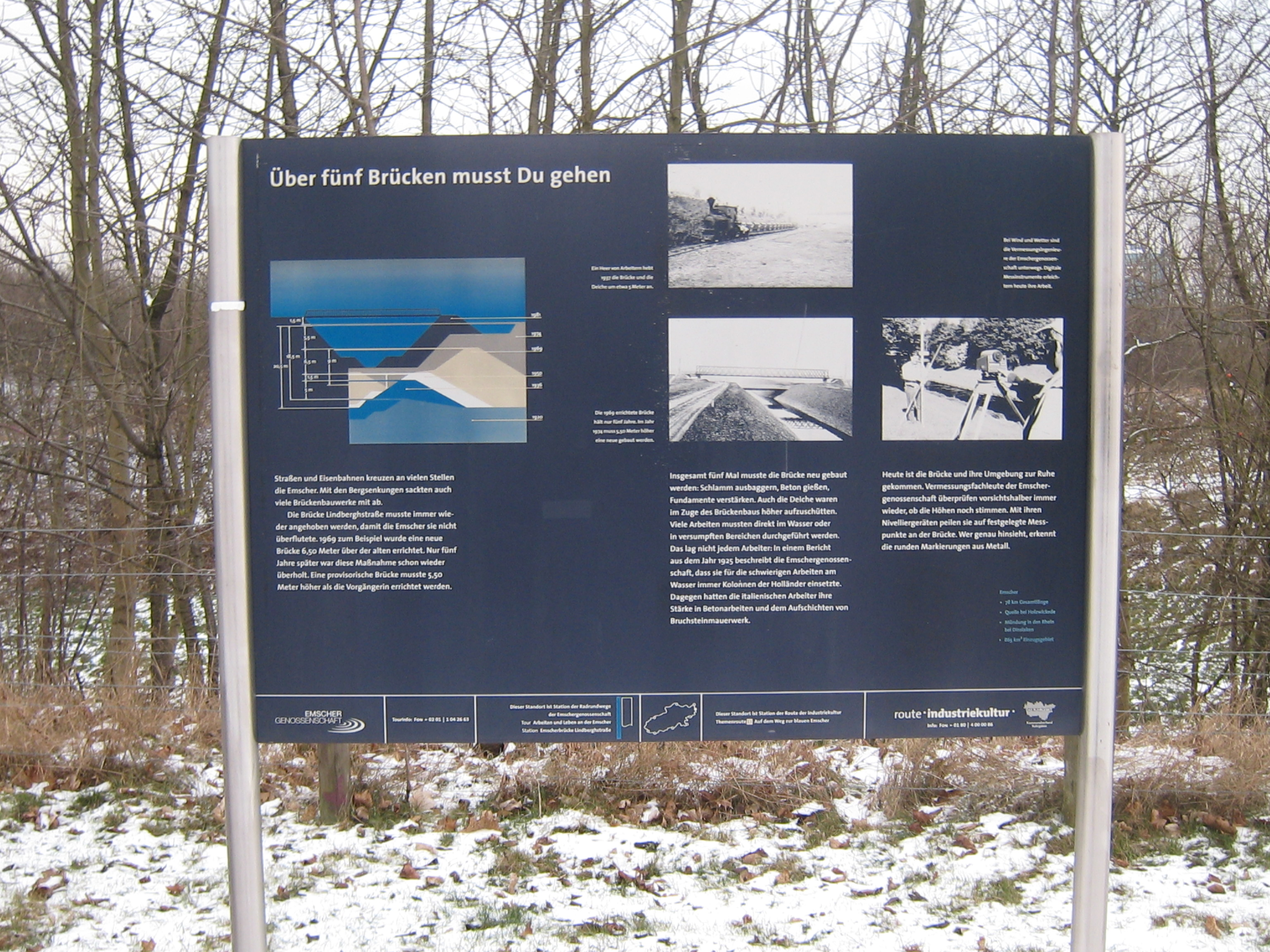 Infotafel nahe der Lindberghstraße (NICHT Parsevalstrasse!)